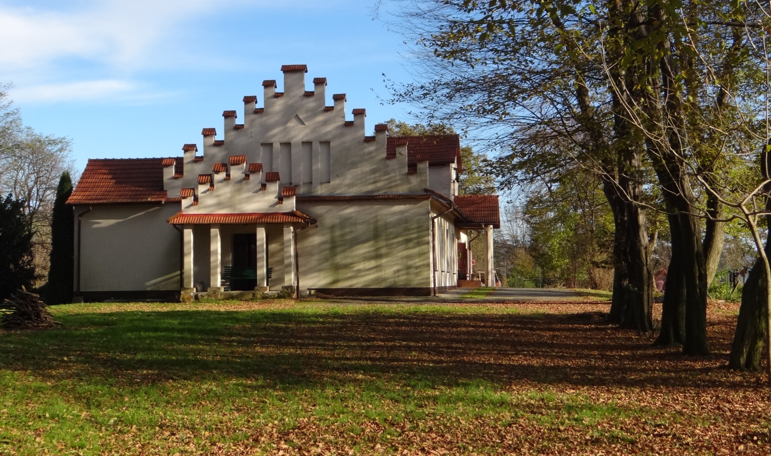 Dworek w Kątach